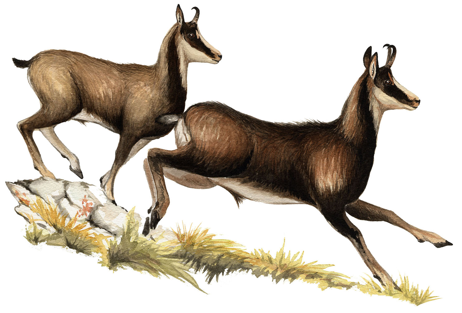 Rebecos cantábricos (Rupicapra pyrenaica parva). Dibujo acuarela